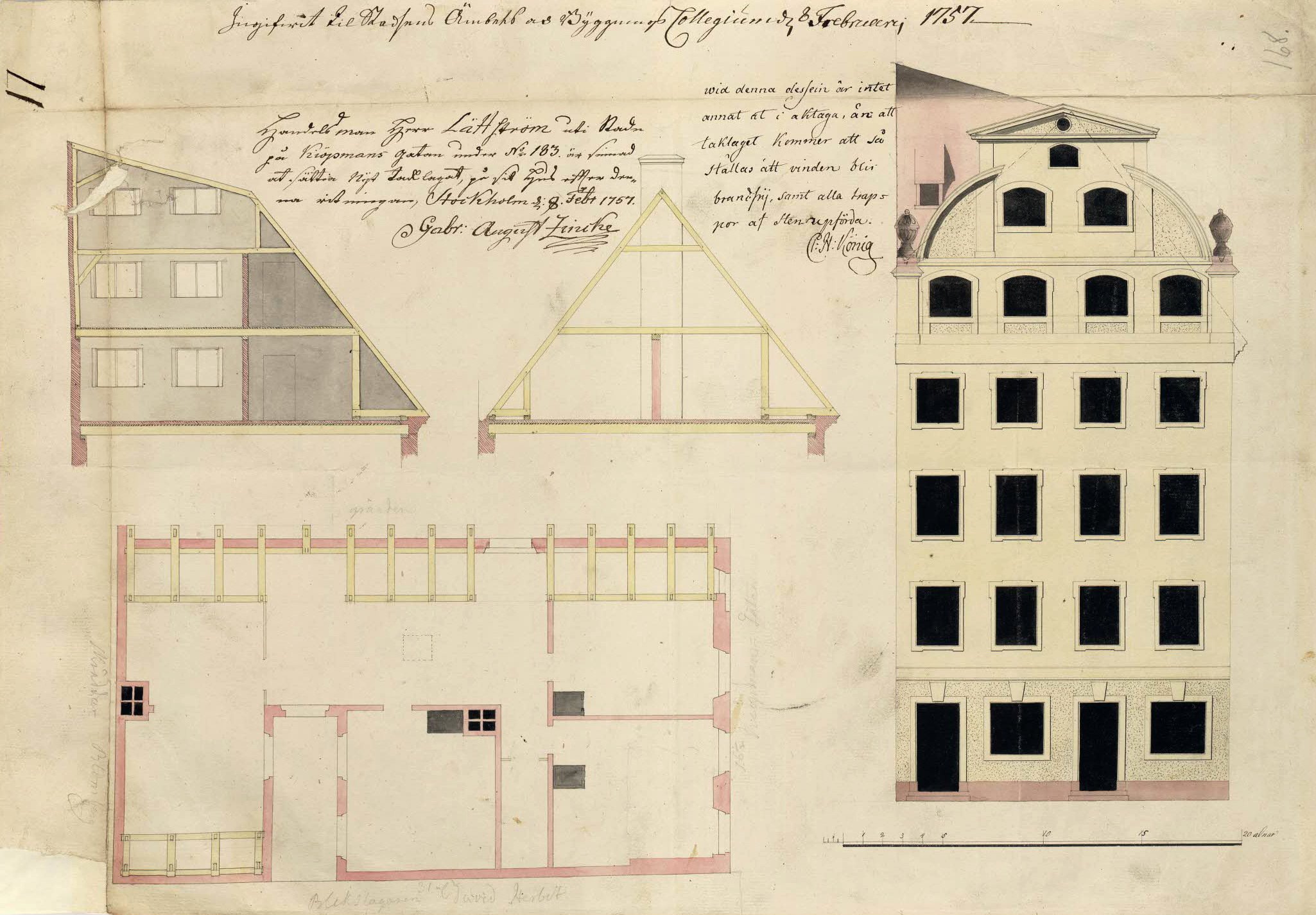 Ritning över fastigheten Phaeton 183 idag Phaeton 5, Köpmangatan 18